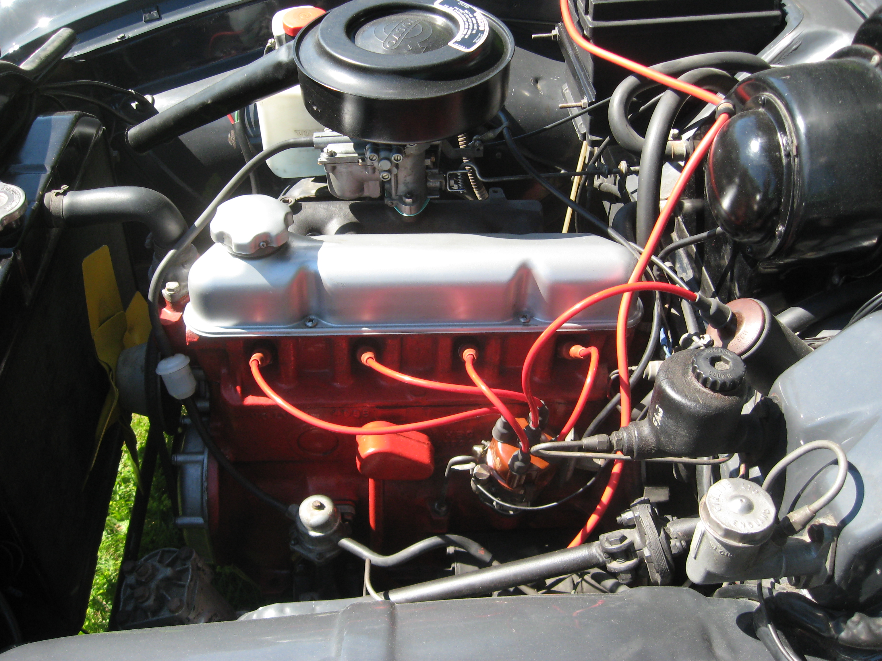 Volvo Amazon engine